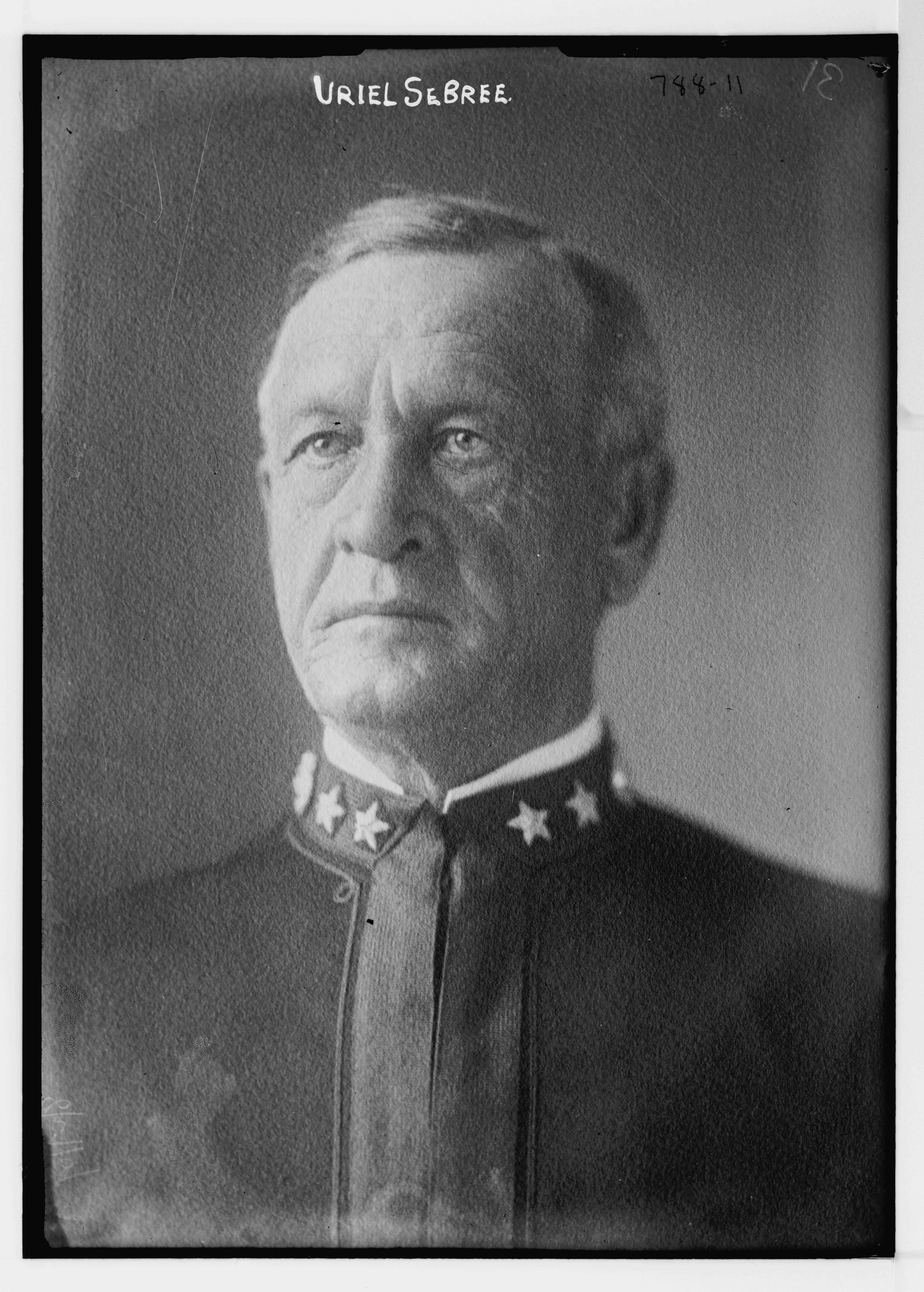 Ameican Rear-Admiral Uriel Sebree (1848-1922)